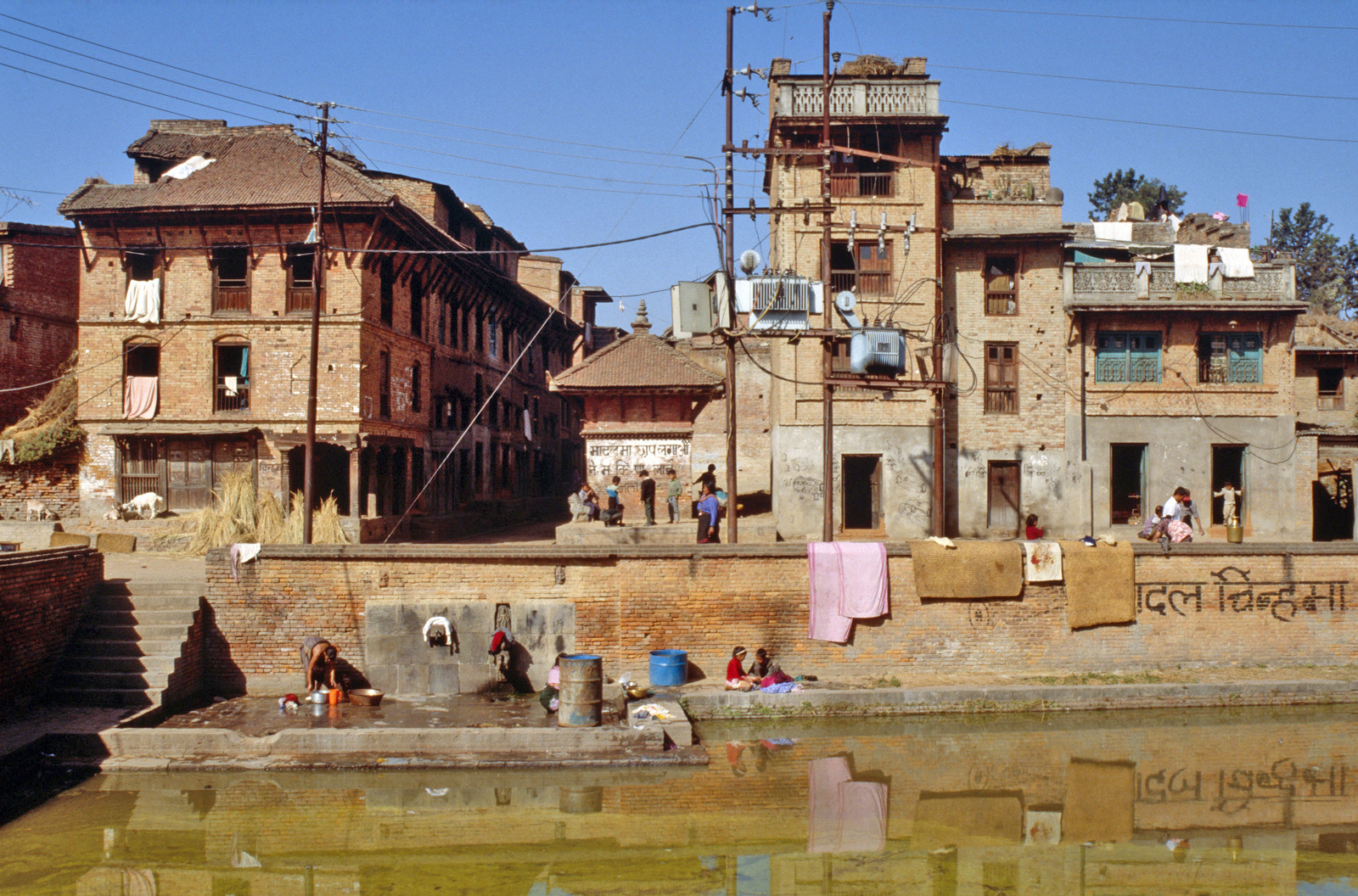 Salan Ganesh Pokhari in Bhaktapur, Nepal